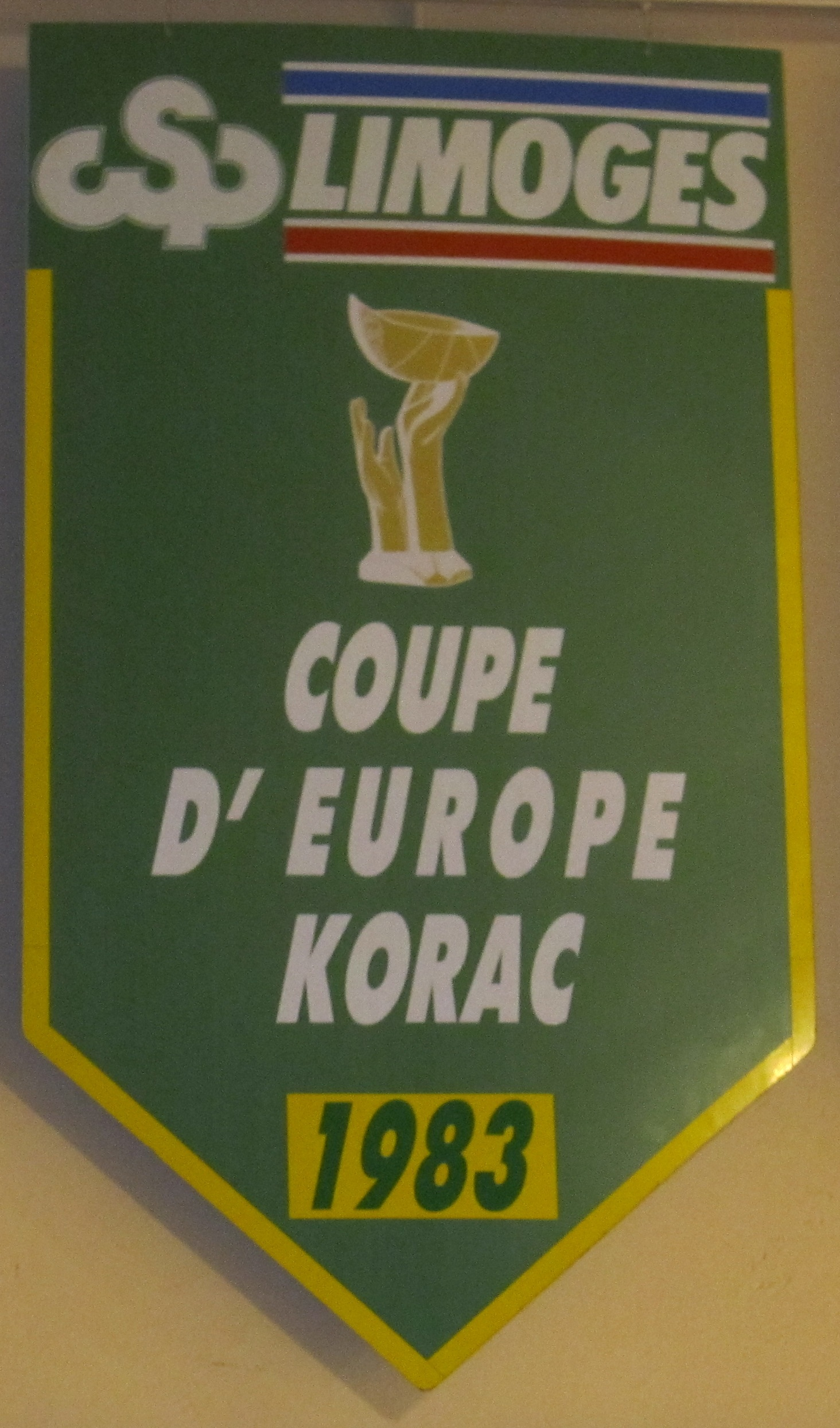 La bannière de la coupe Korac 1983 du Limoges CSP.